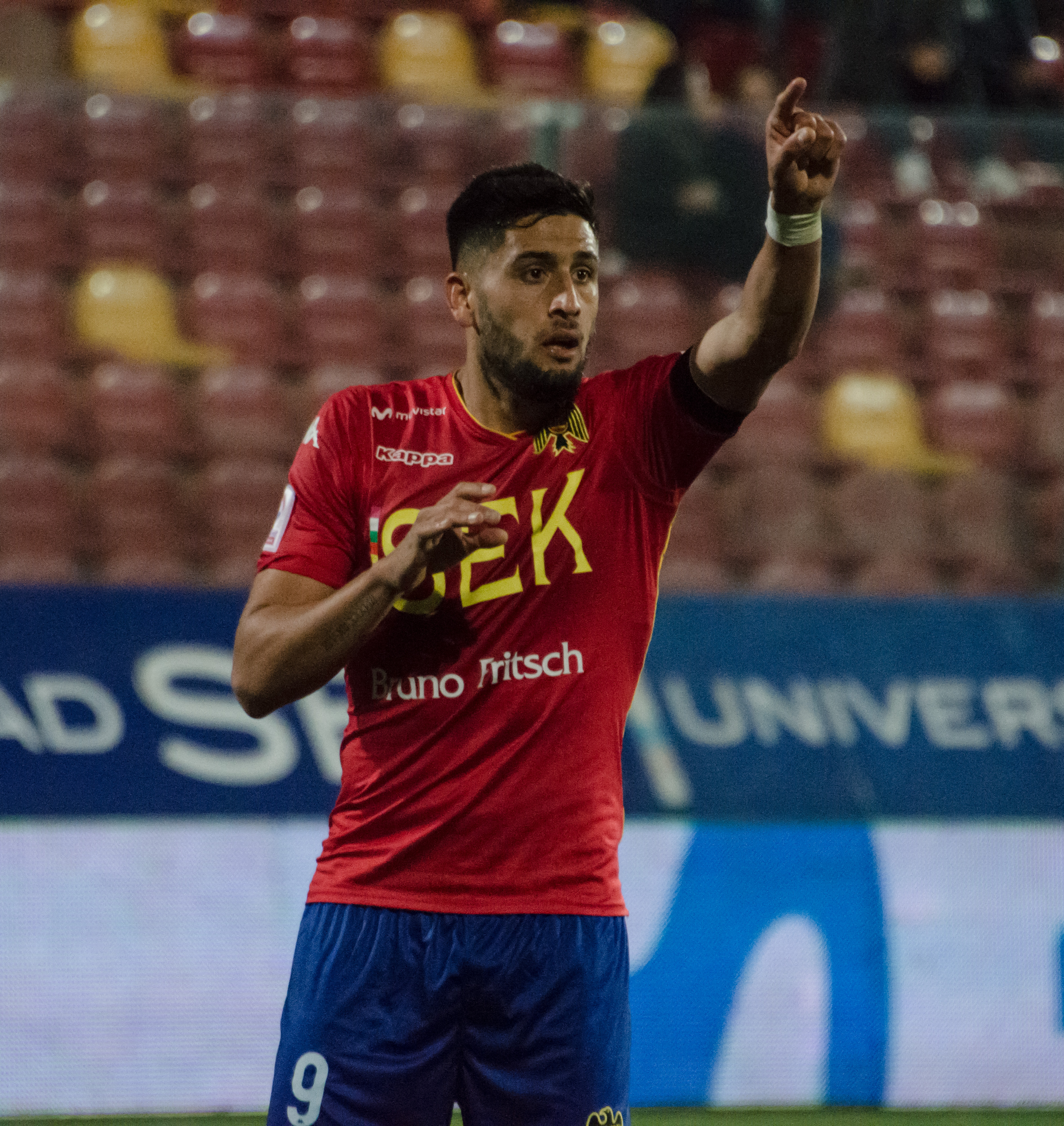 Tobías Figueroa, Unión Española v Curicó Unido, Estadio Santa Laura, Independencia, Santiago, Chile